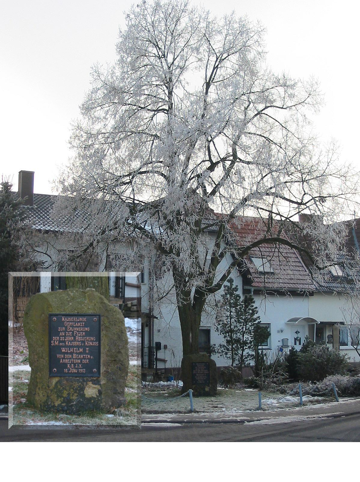 Kaiserlinde Göttelborn, Ecke Hauptstraße,Am Wackenberg